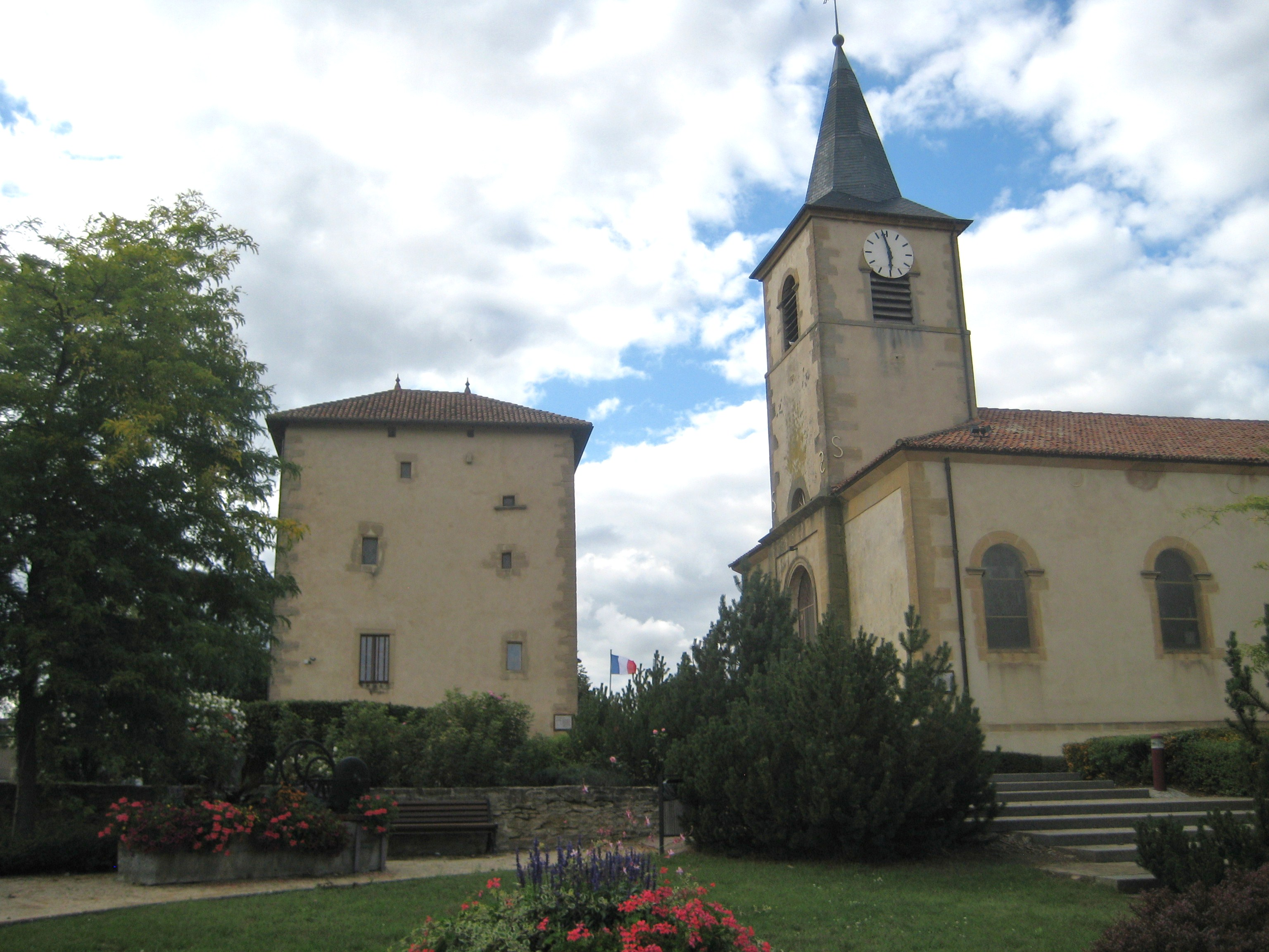 Description tour mahuet eglise Labry Date8 August 2011Sourcemon appareil photoAuthorAimelaimePermission (Reusing this file) tour mahuet eglise Labry